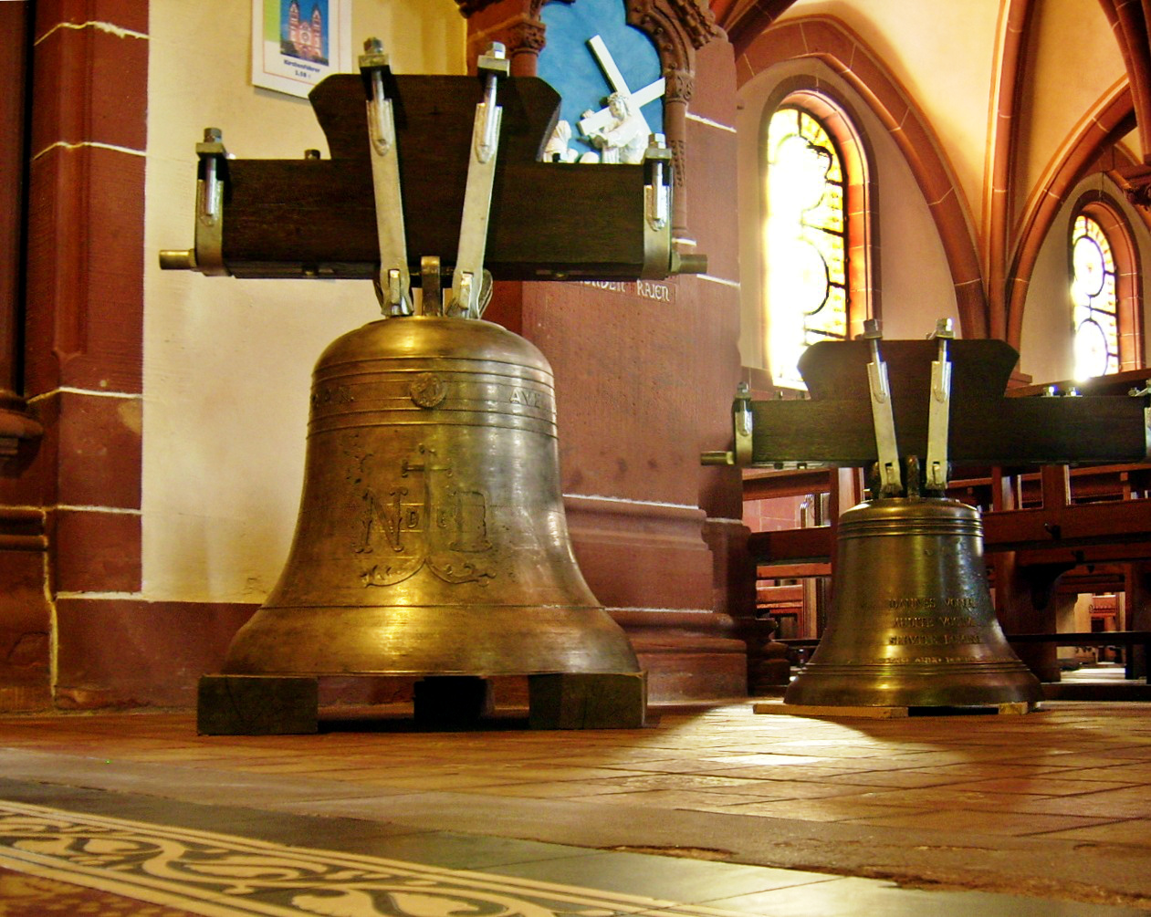 Kirchenglocke